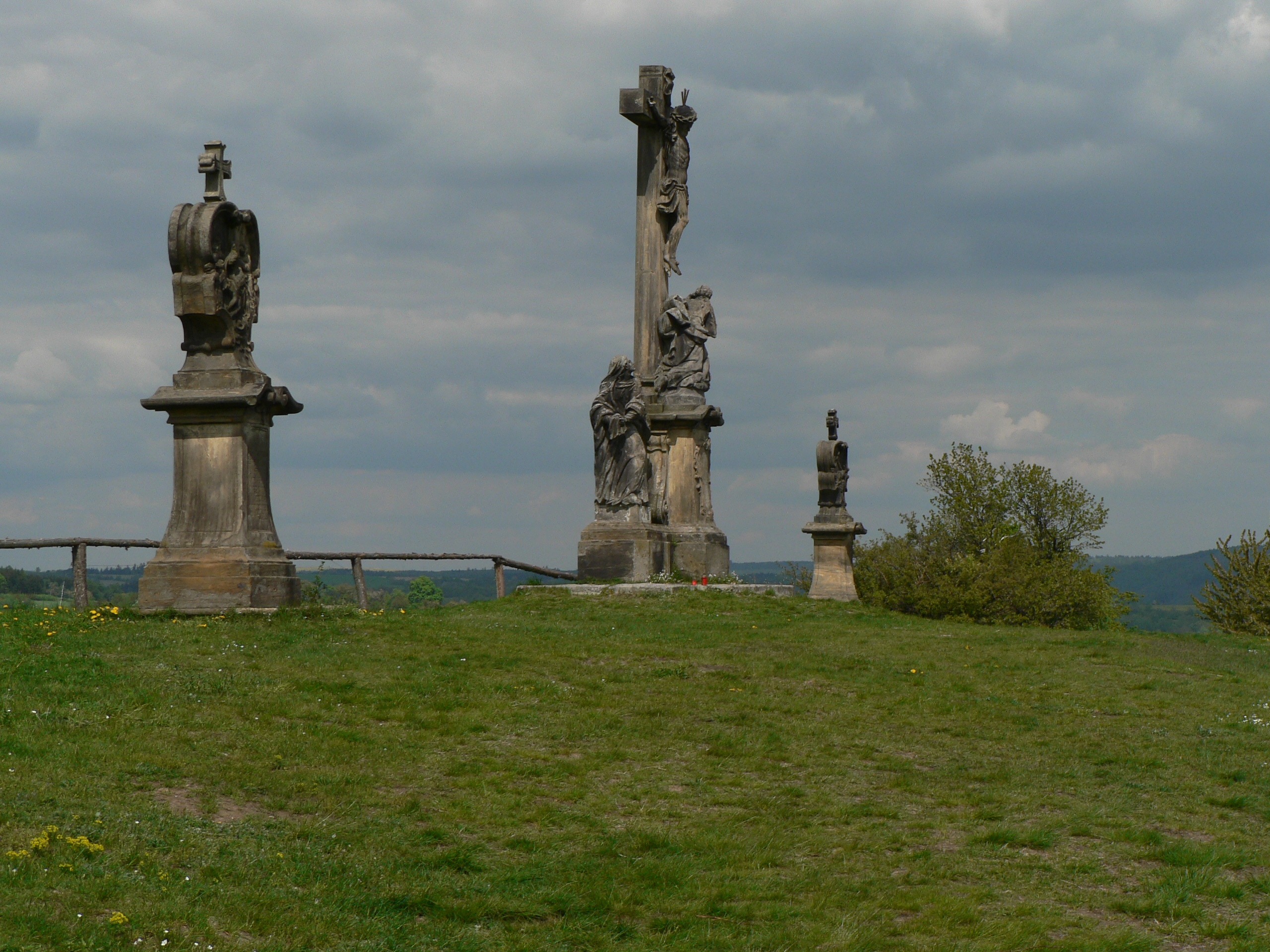 Křížový vrch (Ruda)